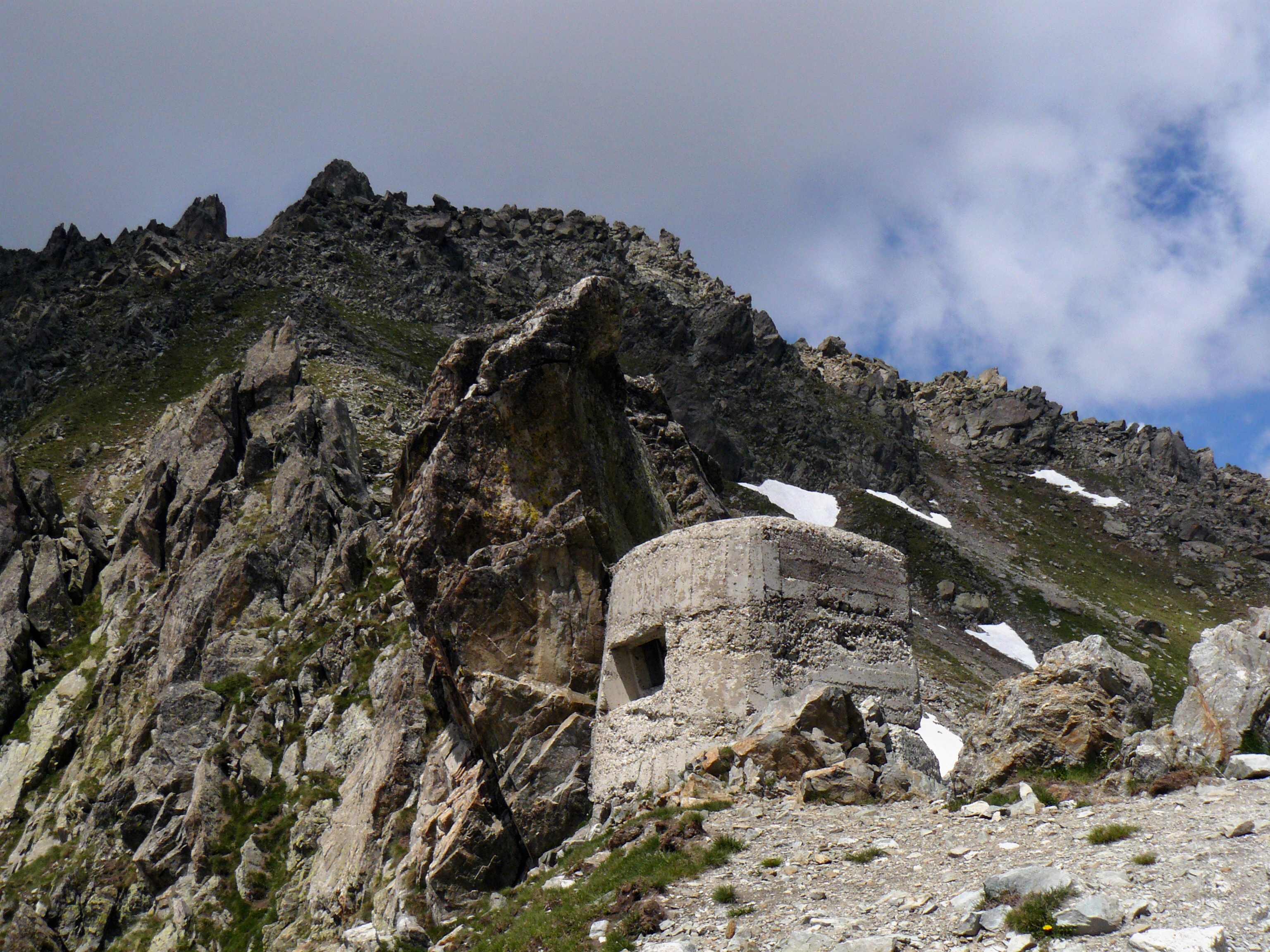 Le col de Fenestre, culminant à 2 474 m, est un col du massif du Mercantour-Argentera séparant l'Italie de la France.